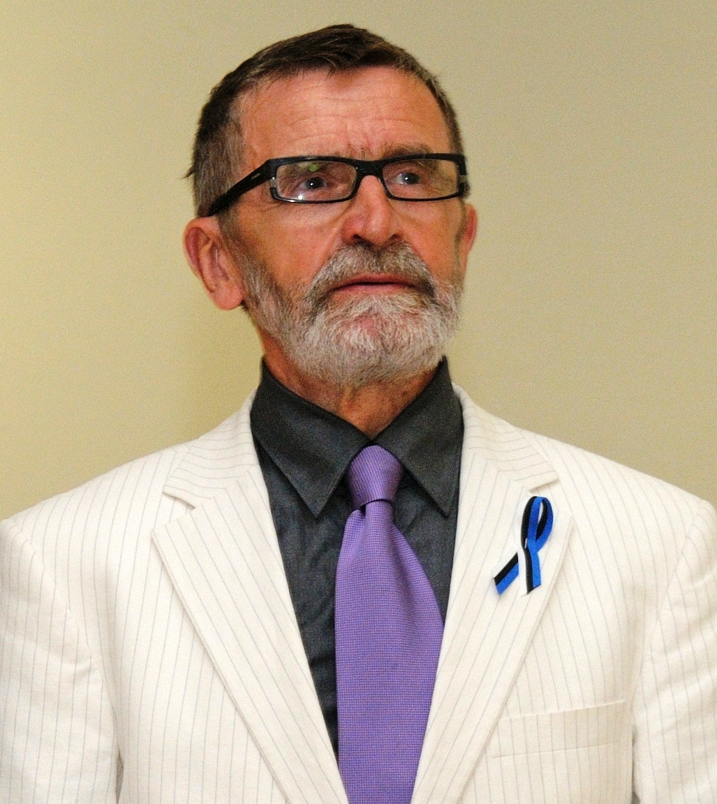 Heinz Valk